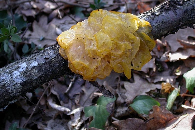 Tremella mesenterica, Gradignan, Gironde, France